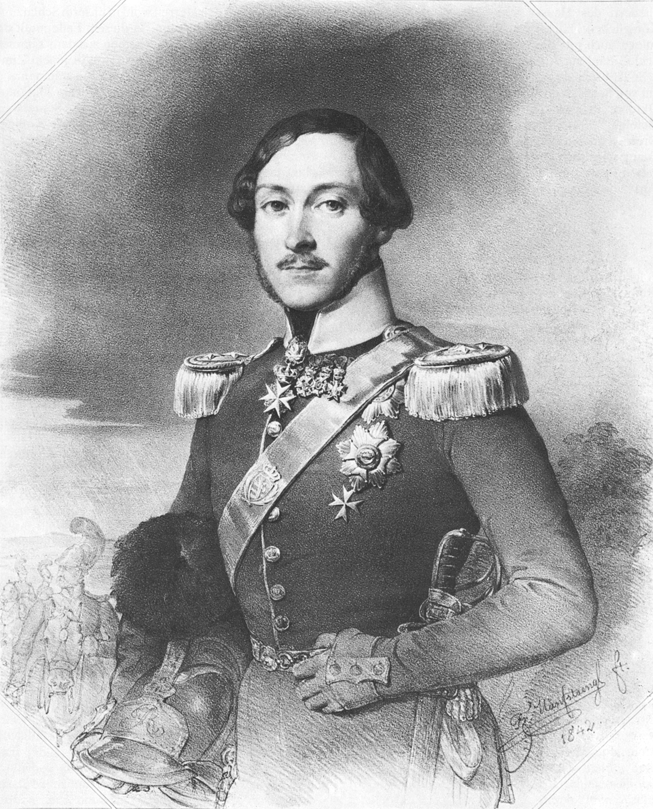 Ernst II. (Herzog von Sachsen-Coburg und Gotha) (1818-1893), Lithography